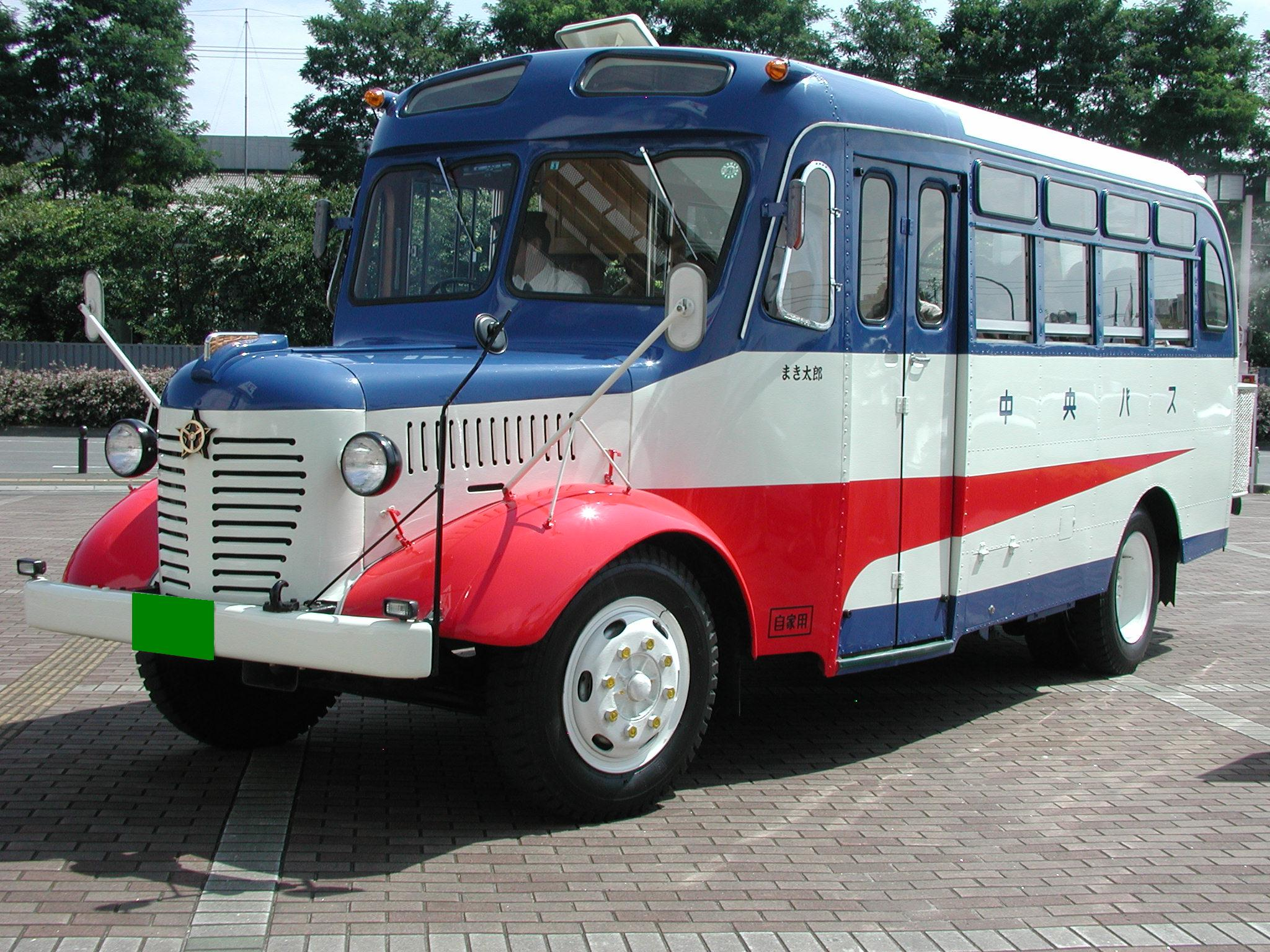 北海道中央バス：まき太郎イトーヨーカドー八戸沼館店（ピアドゥ内）にて（南部バスなどが主催するイベント内より） ※：自家用登録のため、ナンバー部分に隠し処理加工済み。